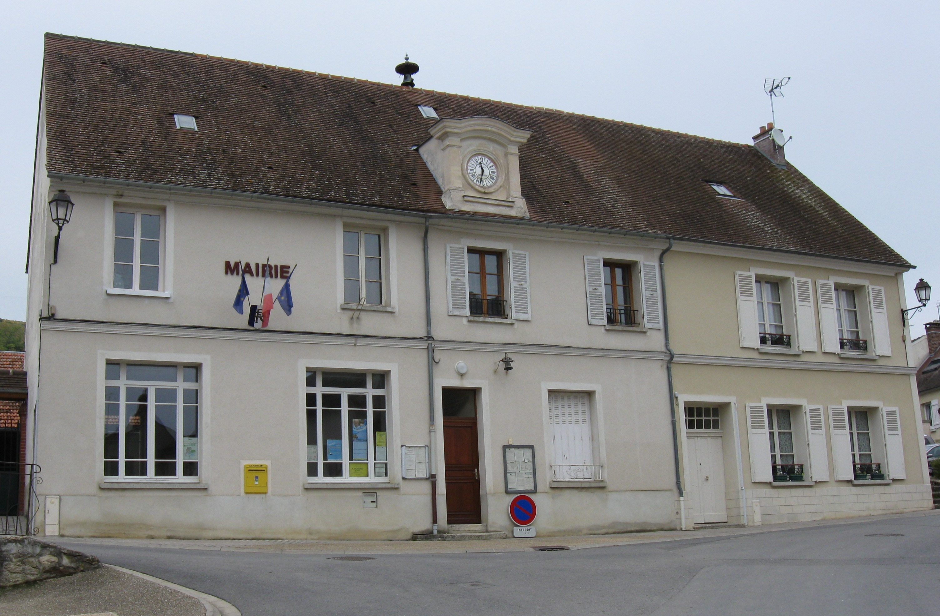 Mairie de Bonneil. (département de l'Aisne, région Picardie).